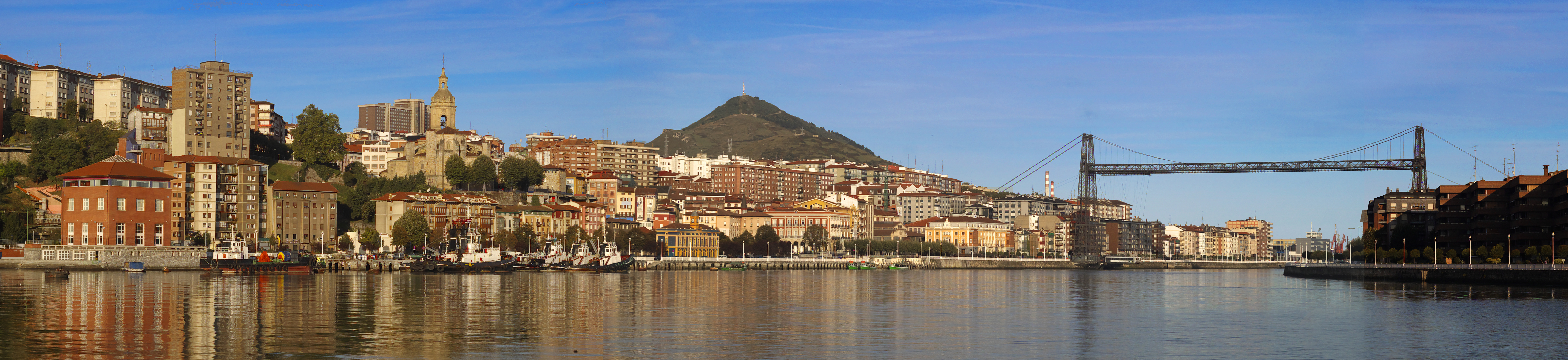 Panoramica de Portugalete. Imagen tomada desde el espigón de la Benedicta.